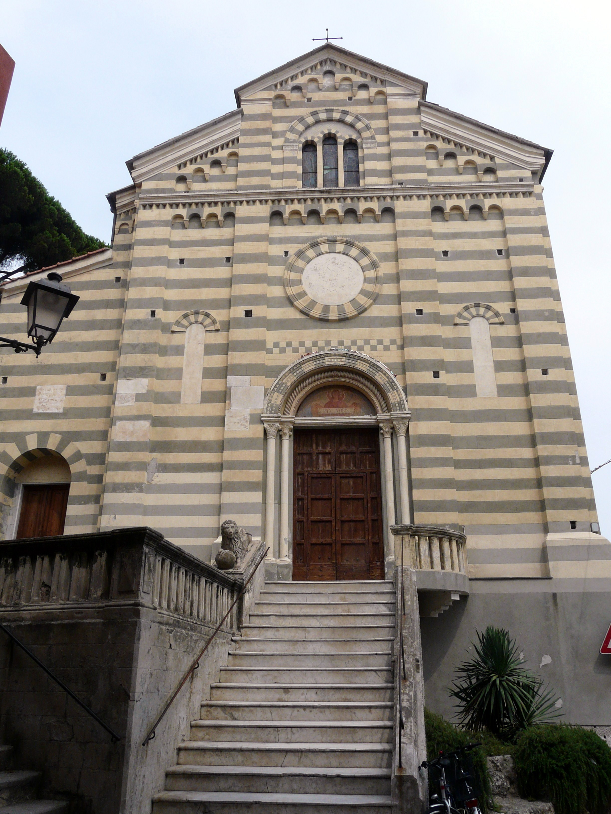 Chiesa di Nostra Signora della Consolazione, Celle Ligure, Liguria, Italia